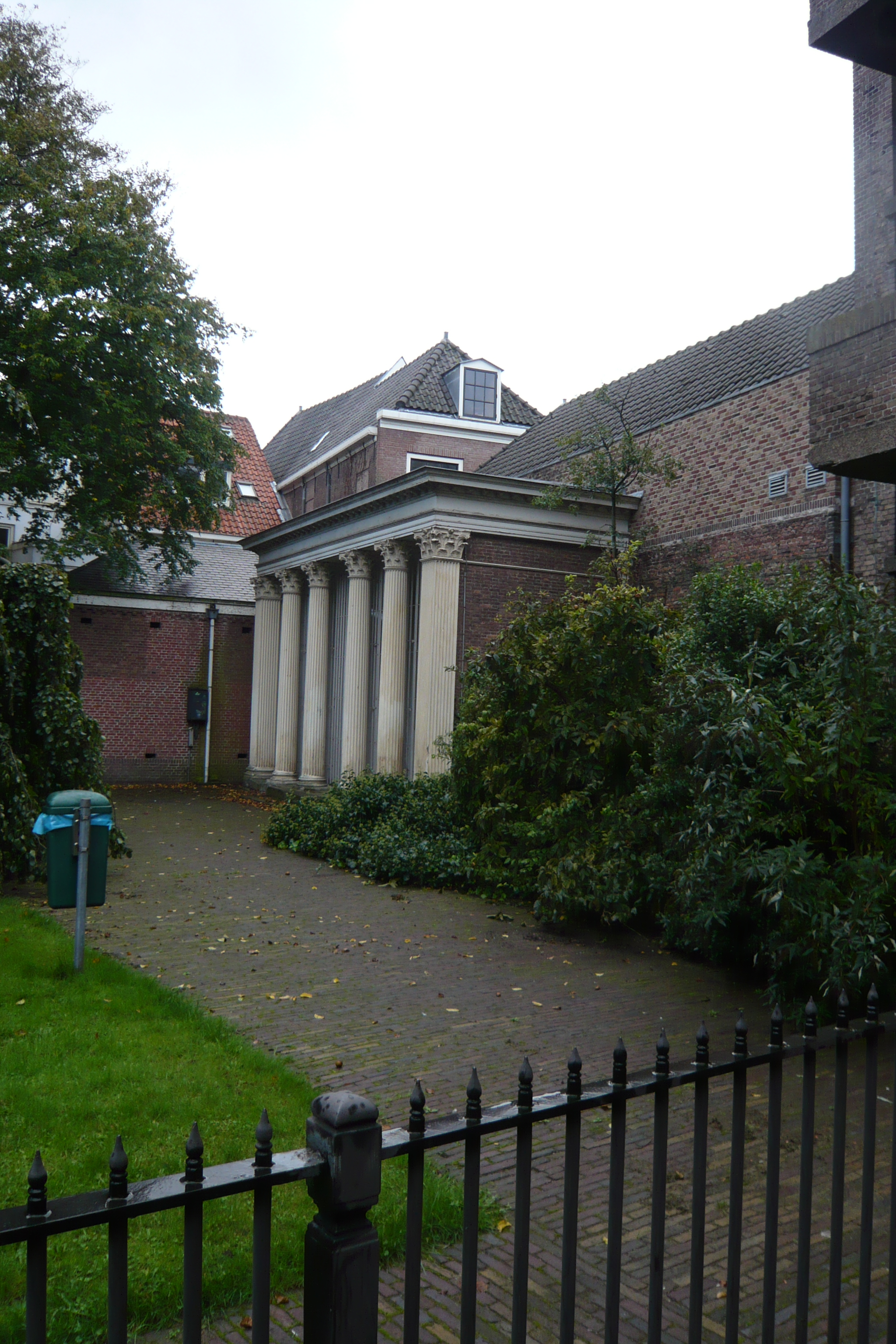 Stedelijk Gym, Haarlem